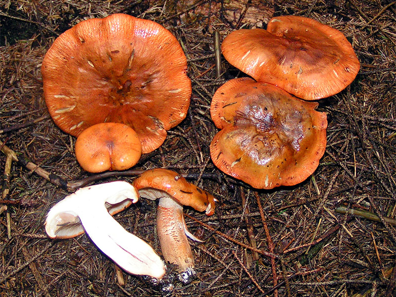 Tricholoma aurantium - Tricholomataceae